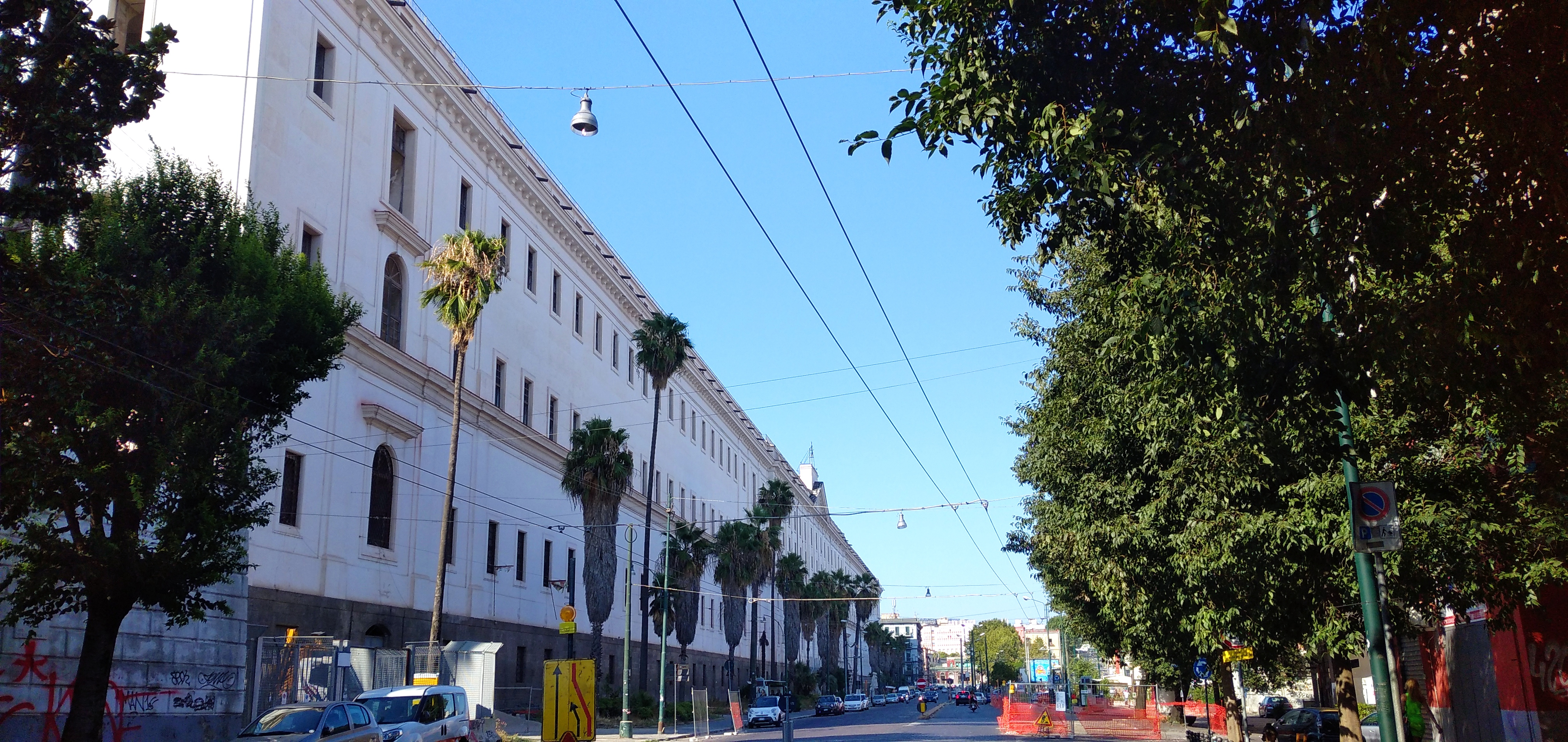 Facciata Reggia dei Poveri, Napoli